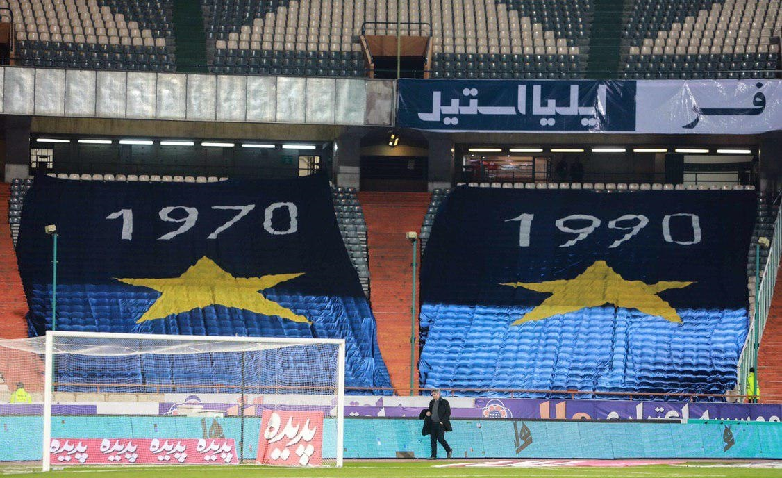 گزارش تصویری از بازی استقلال تهران و پارس جنوبی جم